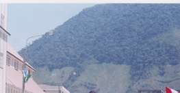 Oxapampa, Perú